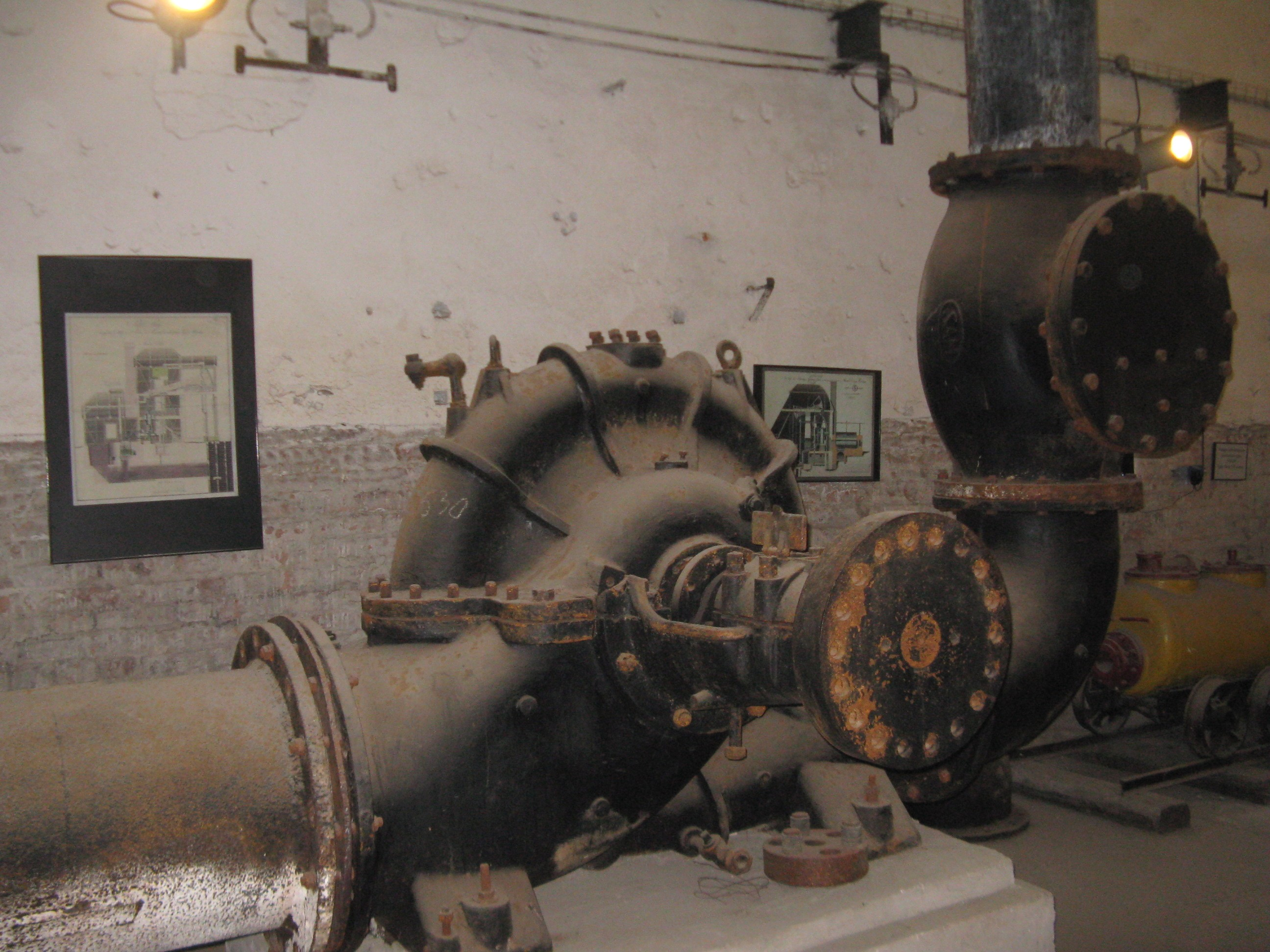 Kopalnia Guido w Zabrzu - poziom 170, hala pomp. Pompa firmy Sulzer (Szwajcaria) z 1928 r. W latach 1932-1986 pracowała na kopalni Matylda w Chrzanowie. Po likwidacji kopalni Matylda przemieszczona do kopalni Guido.